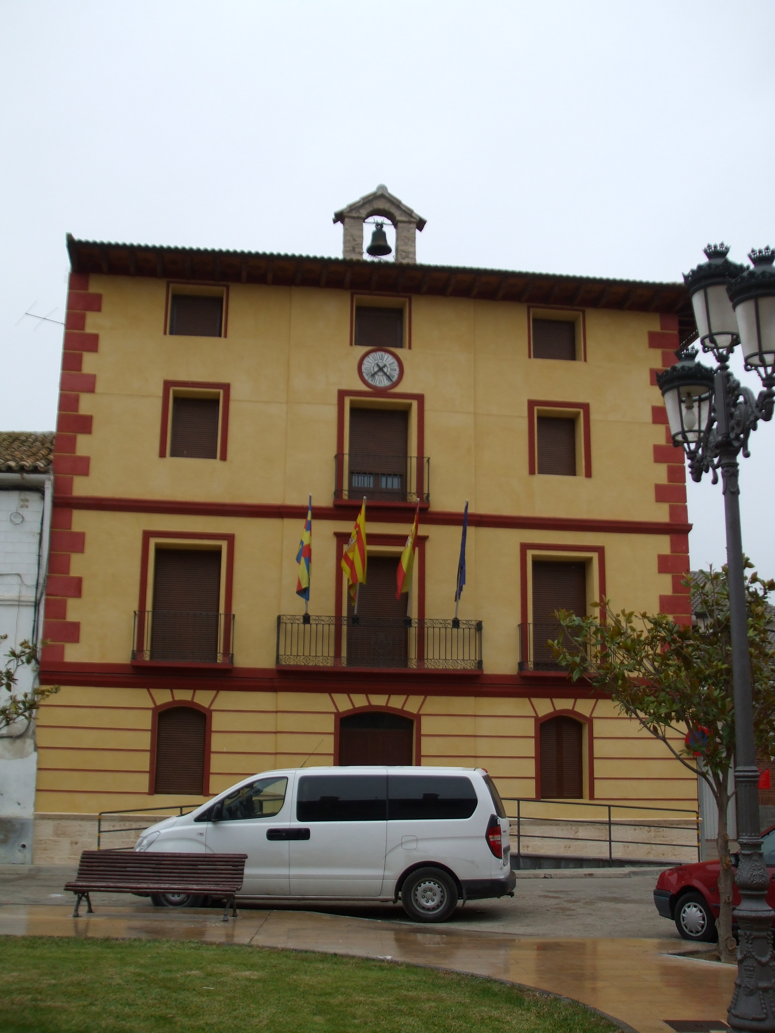 Ayuntamiento de Villafranca de Ebro